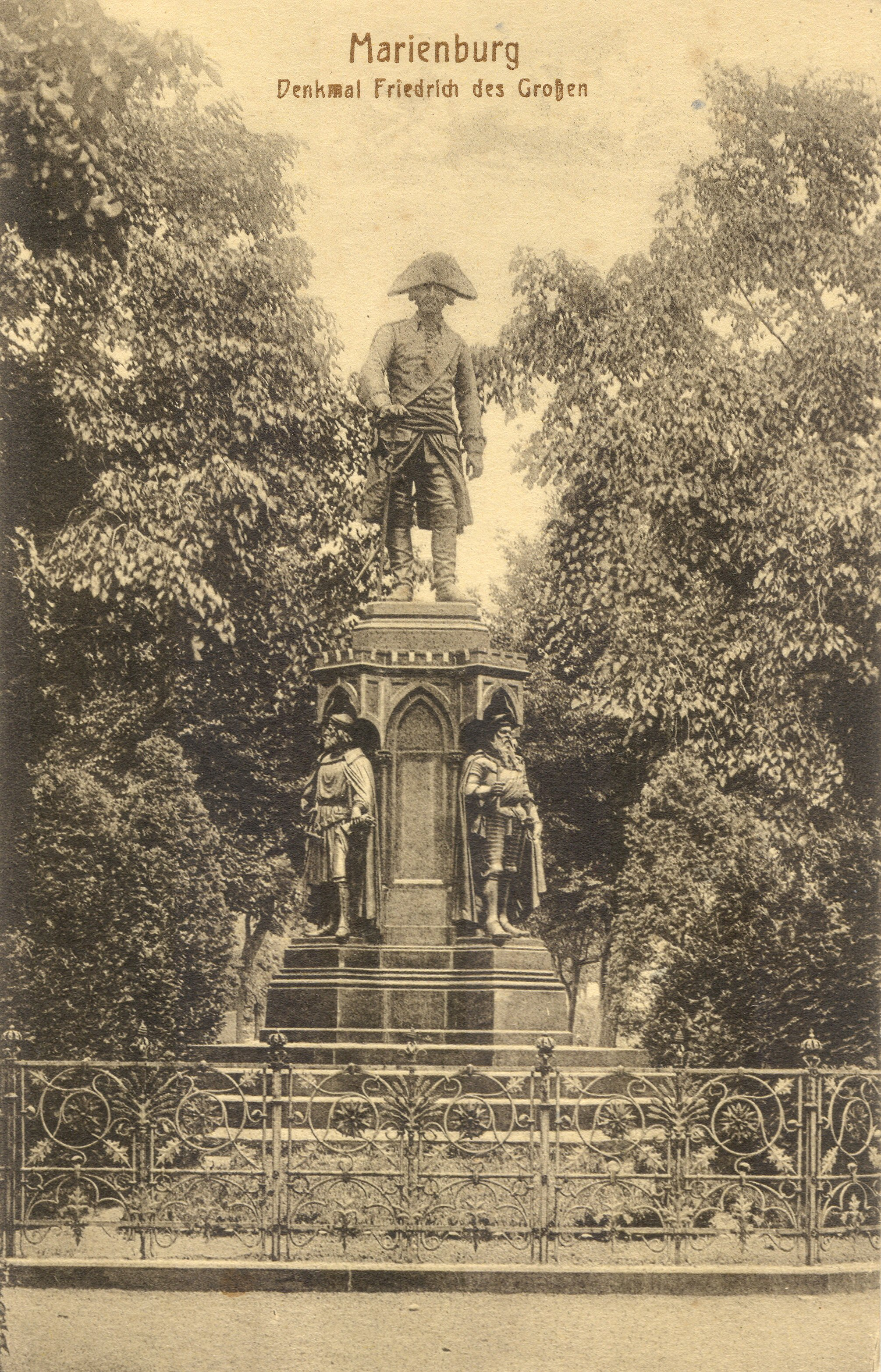 Das Denkmal des Preußenkönigs Friedrich II. vor der Marienburg.